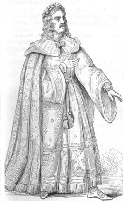 Cola Rienzi – Hr Tichatscheck.